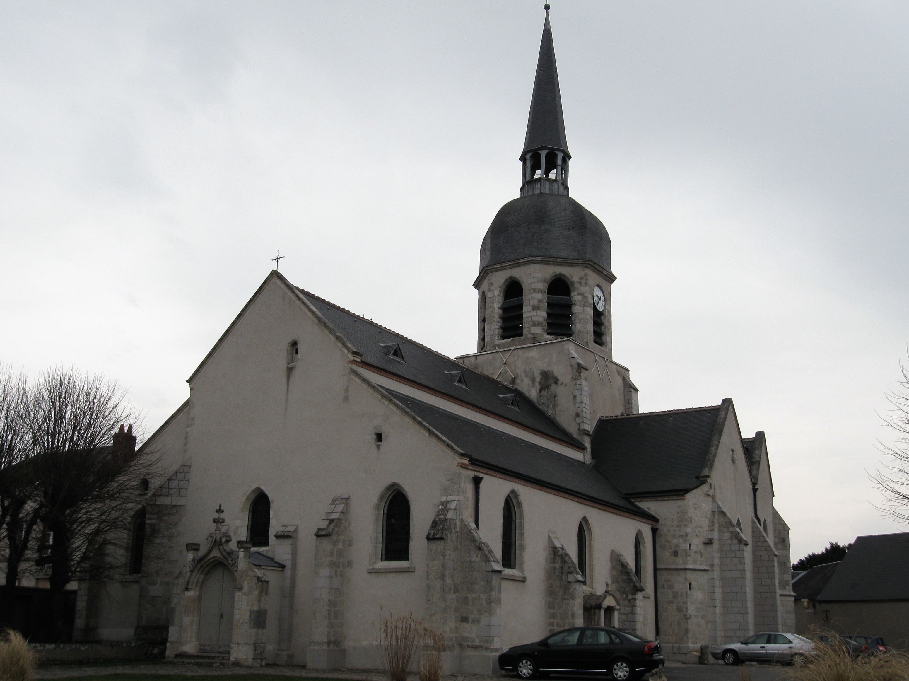 Église Saint-Victor, Artenay, Loiret, France